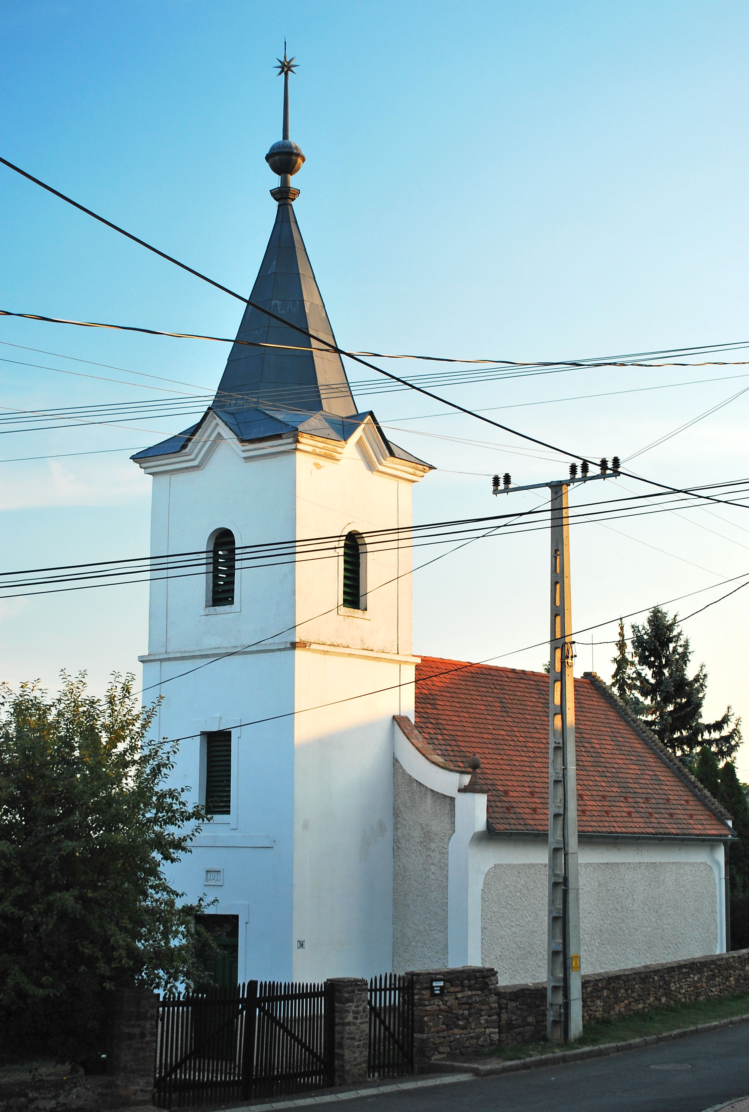 Balatonszepezdi református templom